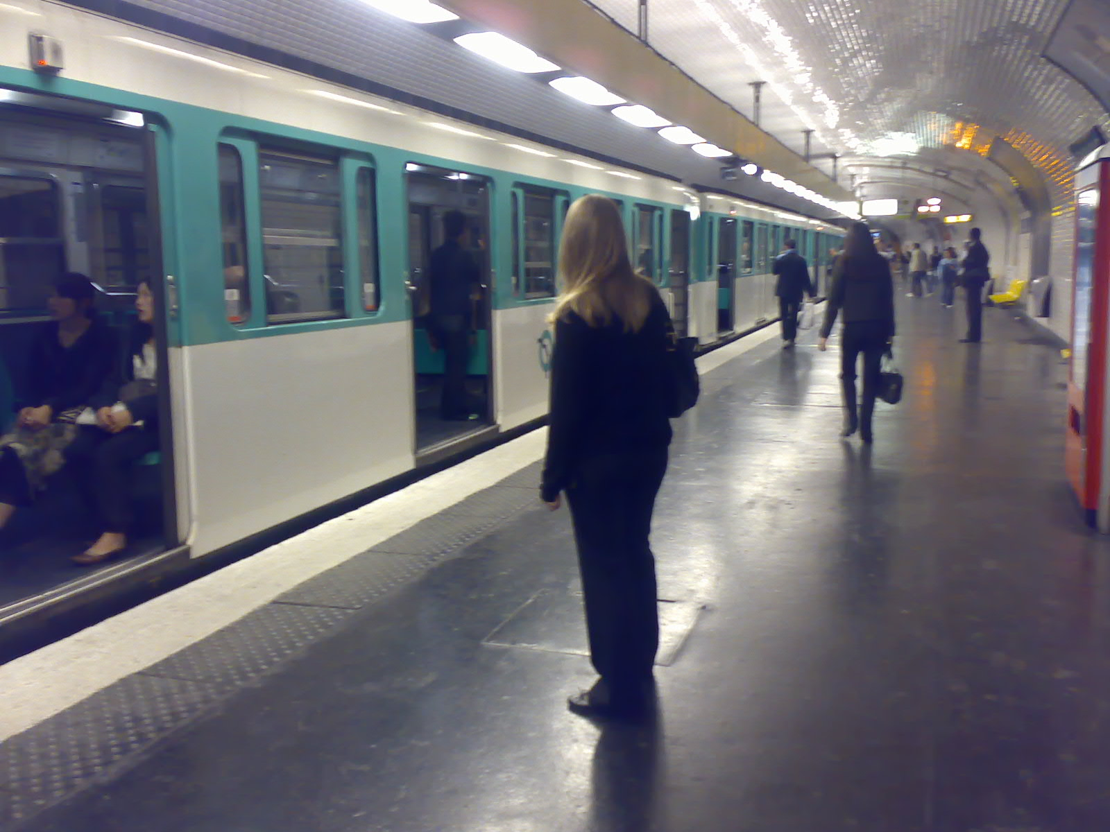 République station (Ligne 9) on the Paris Métropolitain network.